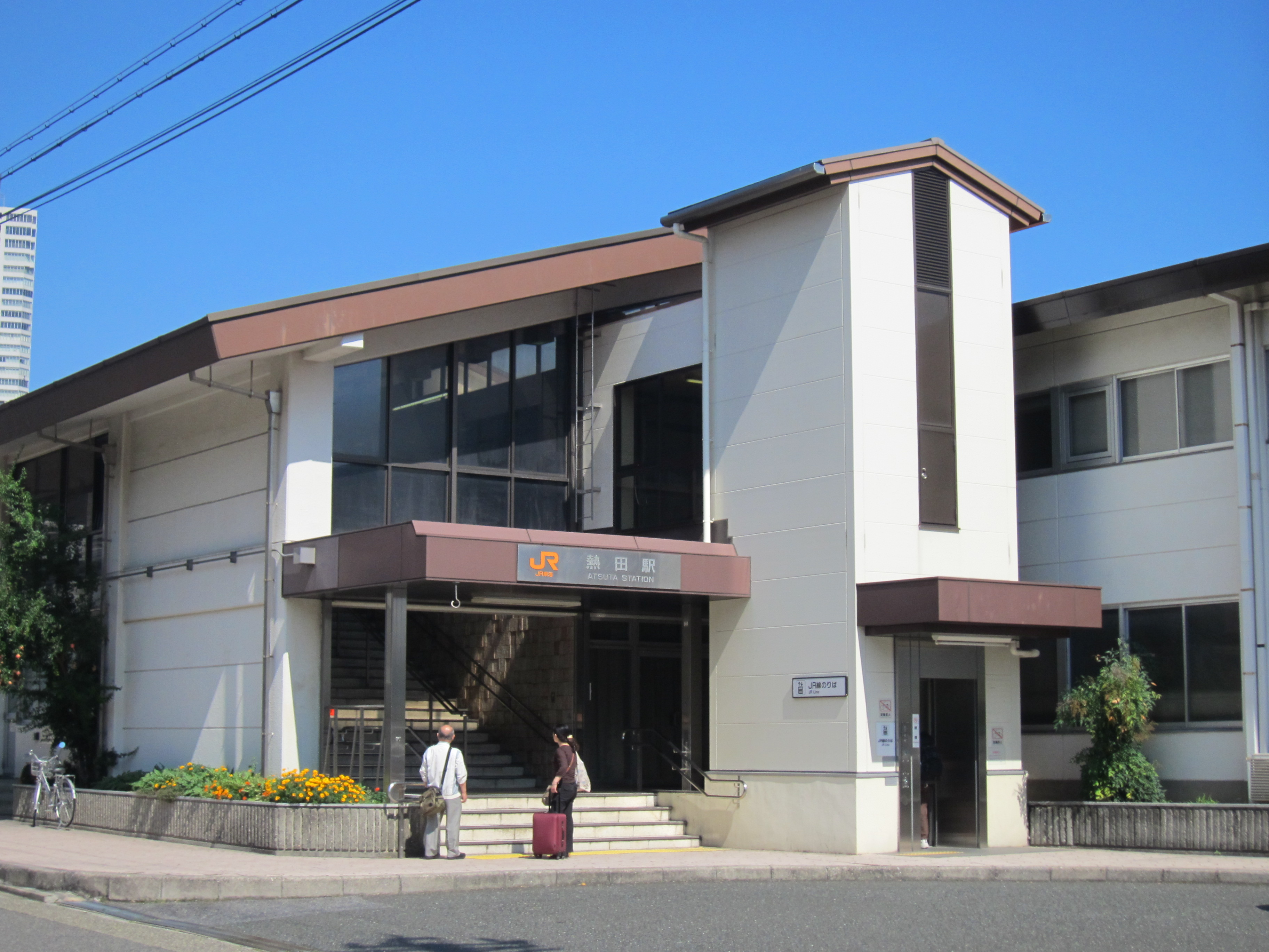 JR東海道線熱田駅